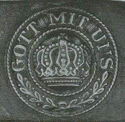 Prussian belt buckle until 1918